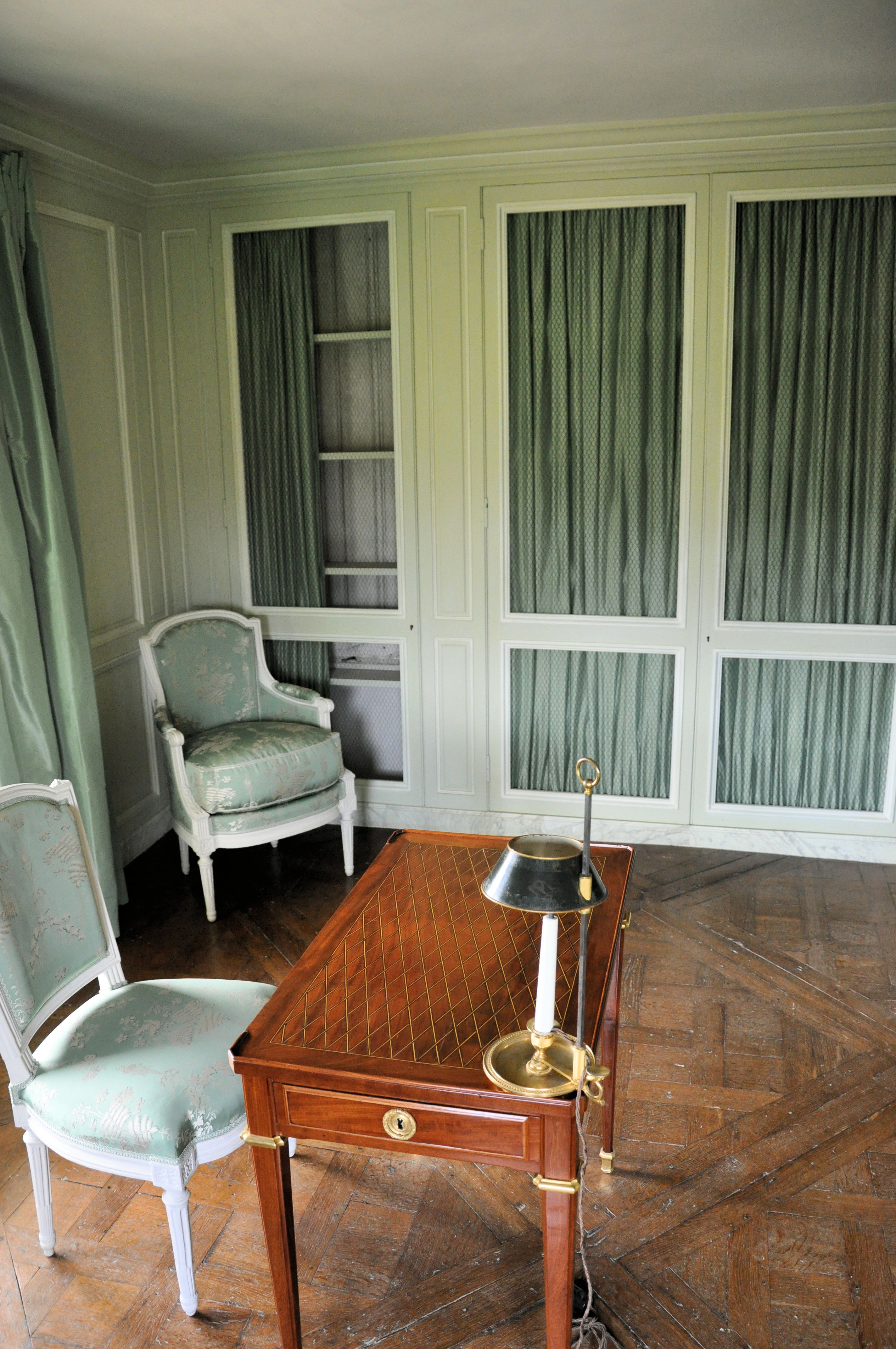 Petit Trianon - Bibliothèque de l'entresol